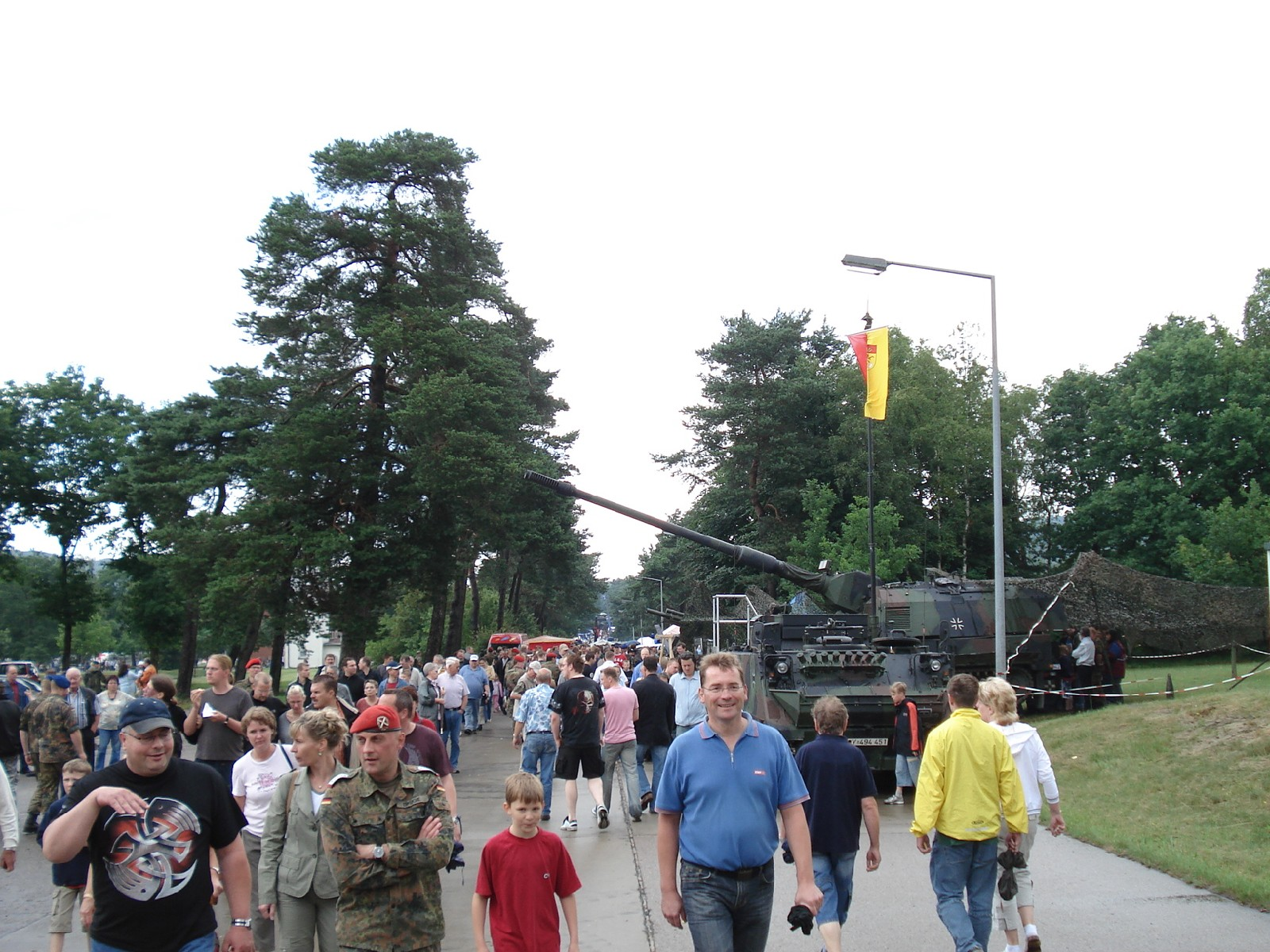 Paradestraße_beim_AST_am_16.06.2007